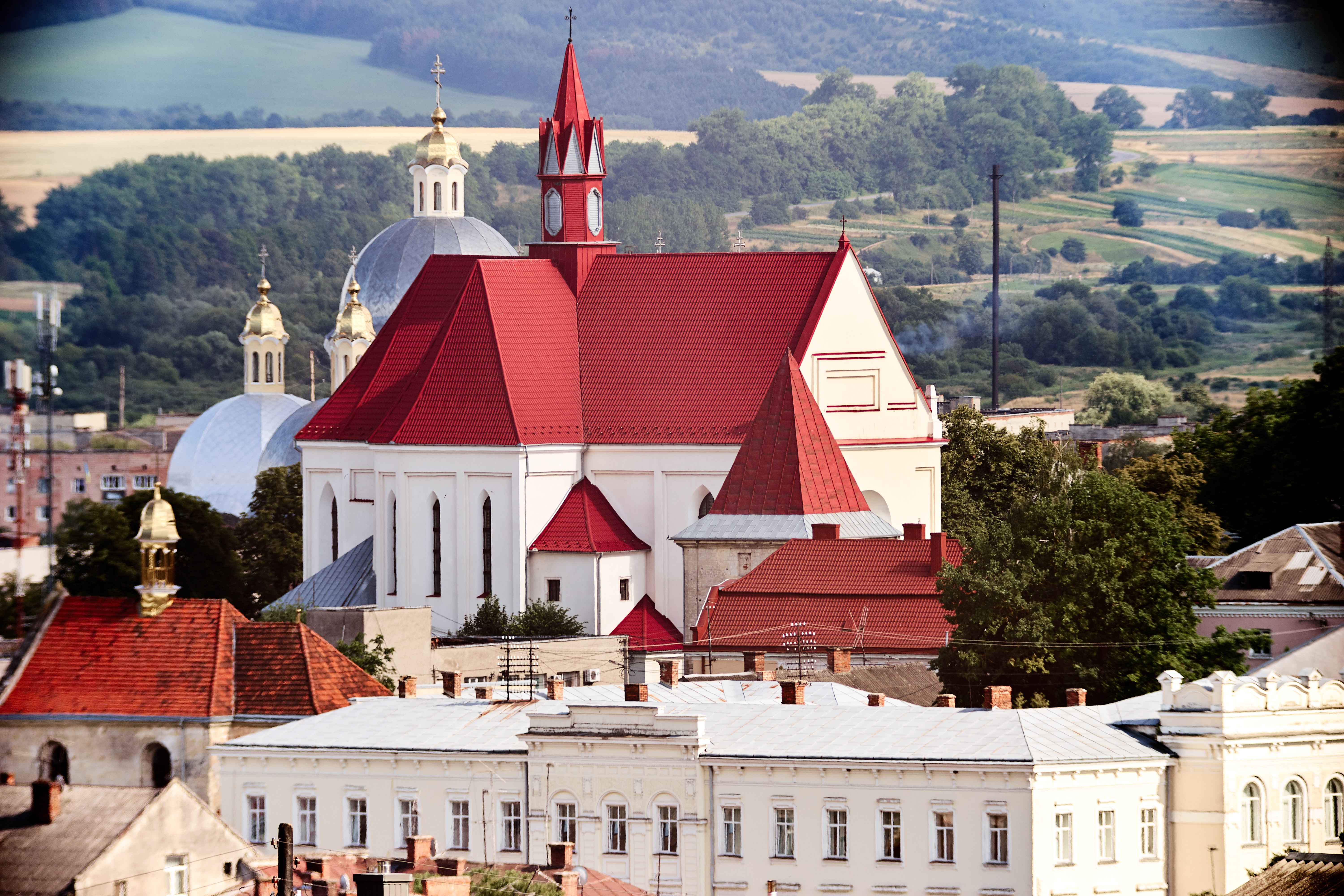 Костел святих апостолів Петра і Павла в Бережанах Вид із гори Сторожисько